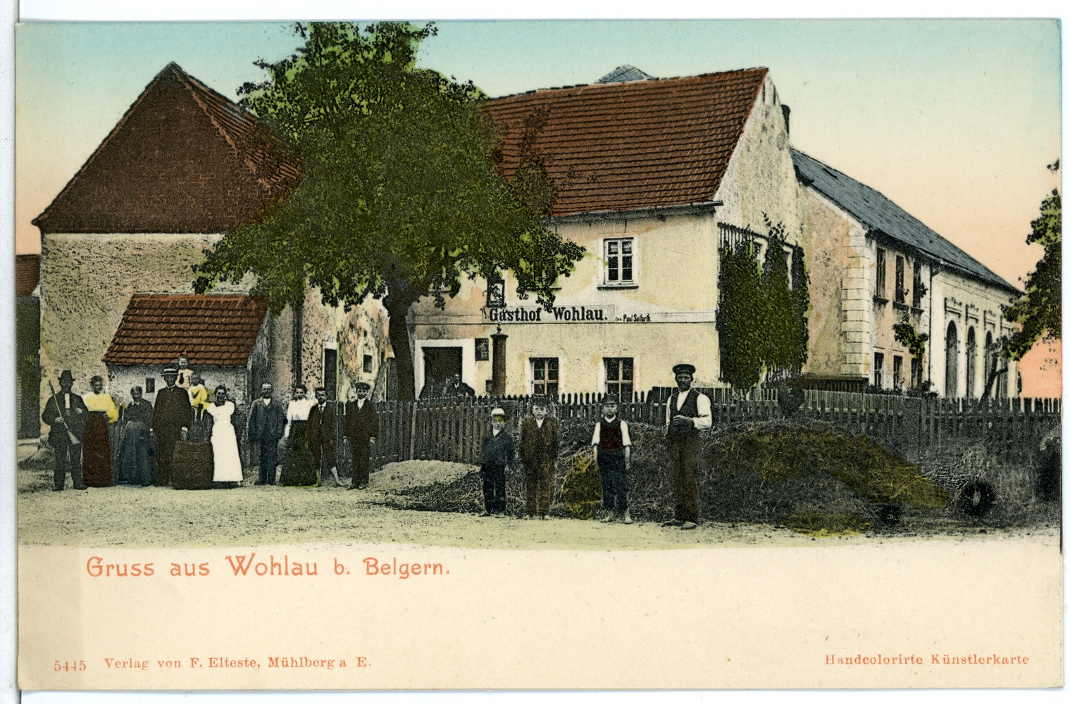 Wohlau; Gasthof Diese Ansichtskarte stammt vom Kunstverlag Brück & Sohn aus Meißen ( Die Karte hat die eindeutige Nummer 05445 und ist in höherer Auflösung beim Verlag erhältlich. Sie wurde im Rahmen einer Kooperation zwischen Wikipedianern und dem Kunstverlag für Wikimedia Commons zur Verfügung gestellt.